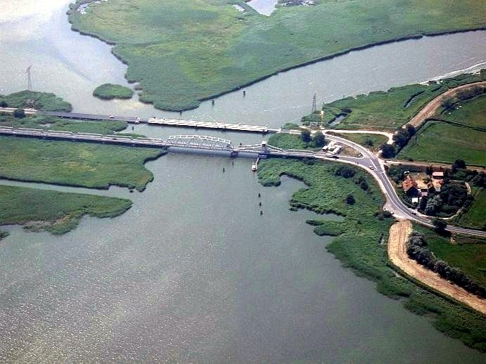 Luftbildaufnahme der Meiningenbrücke